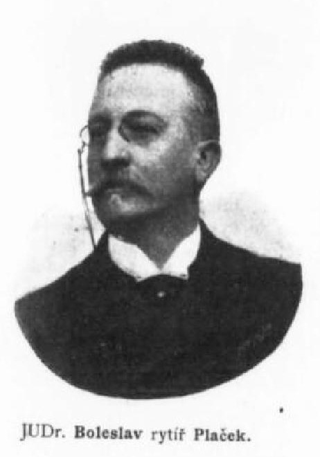 Boleslav rytíř Plaček (1846-1908), rakouský a český právník a politik